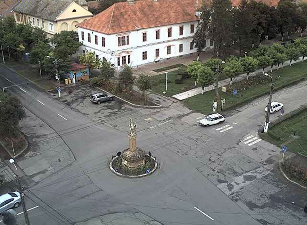 Statuia „Sf. Florian”